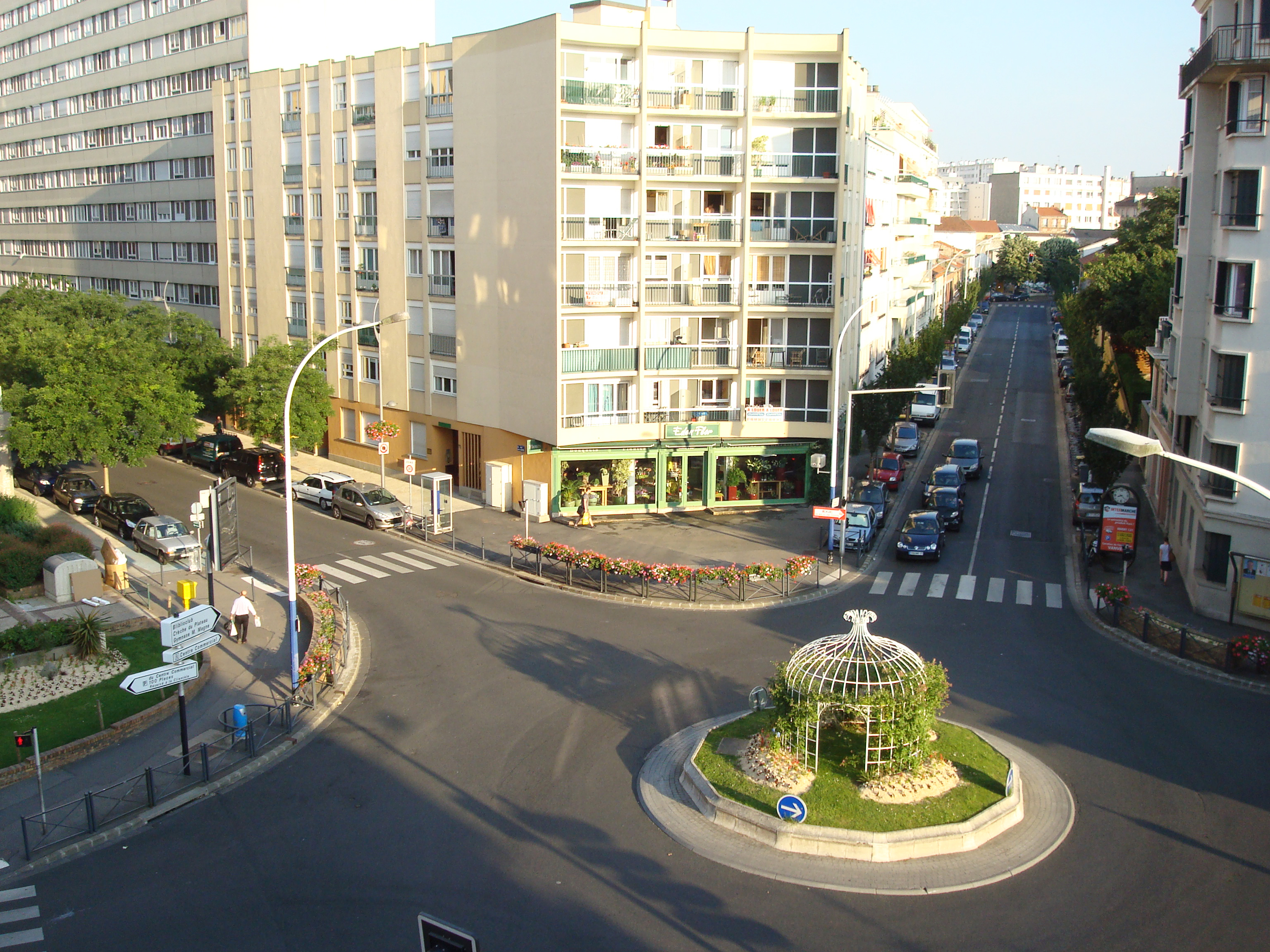 Photographie du carrefour Albert-Legris, situé à Vanves.